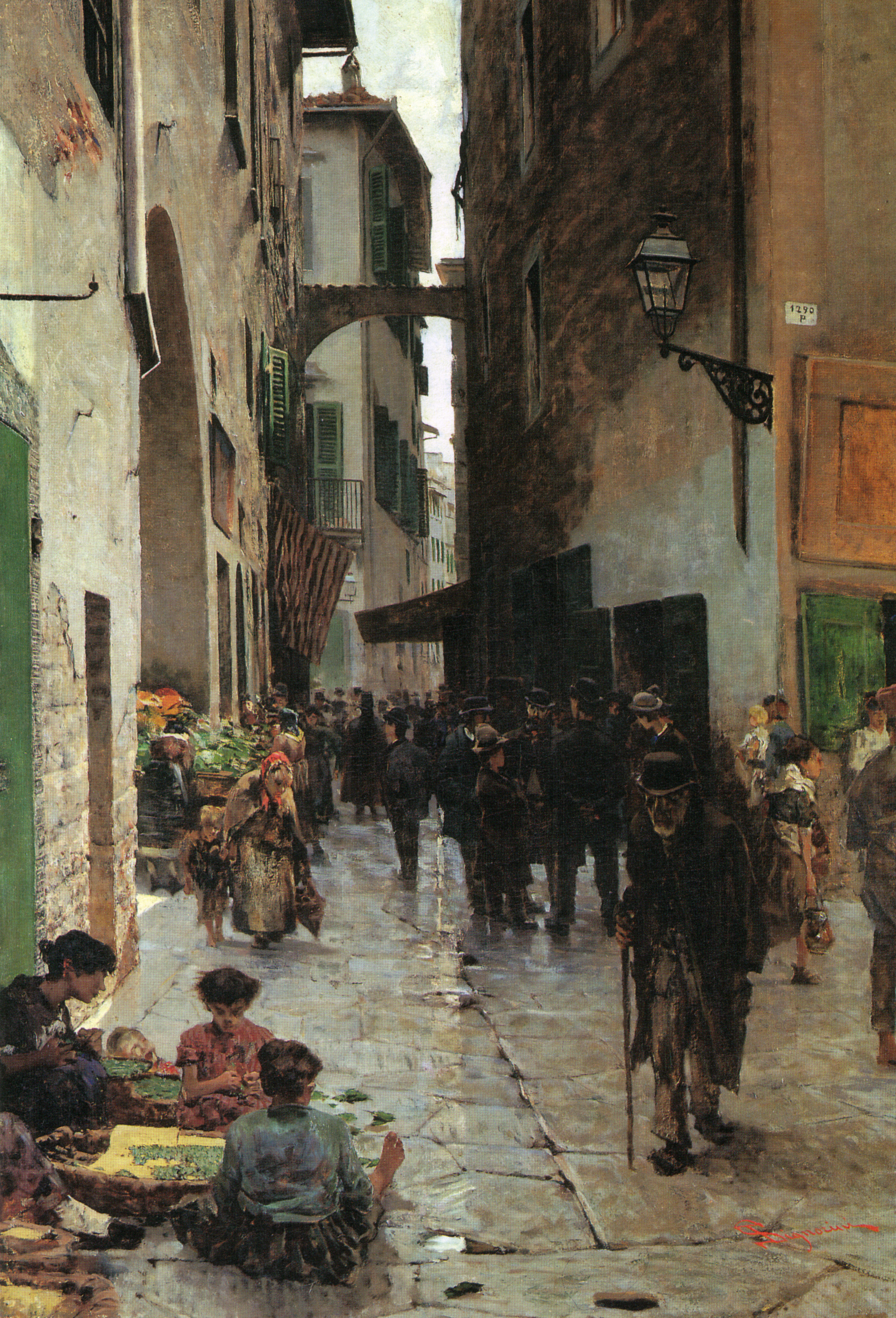 Fonte_del_Mercato_Vecchiolabel QS:Lit,"Fonte_del_Mercato_Vecchio"